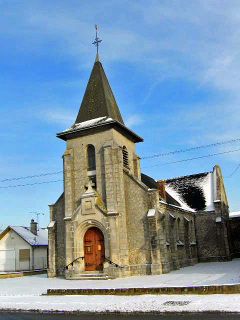 église de Pierremande